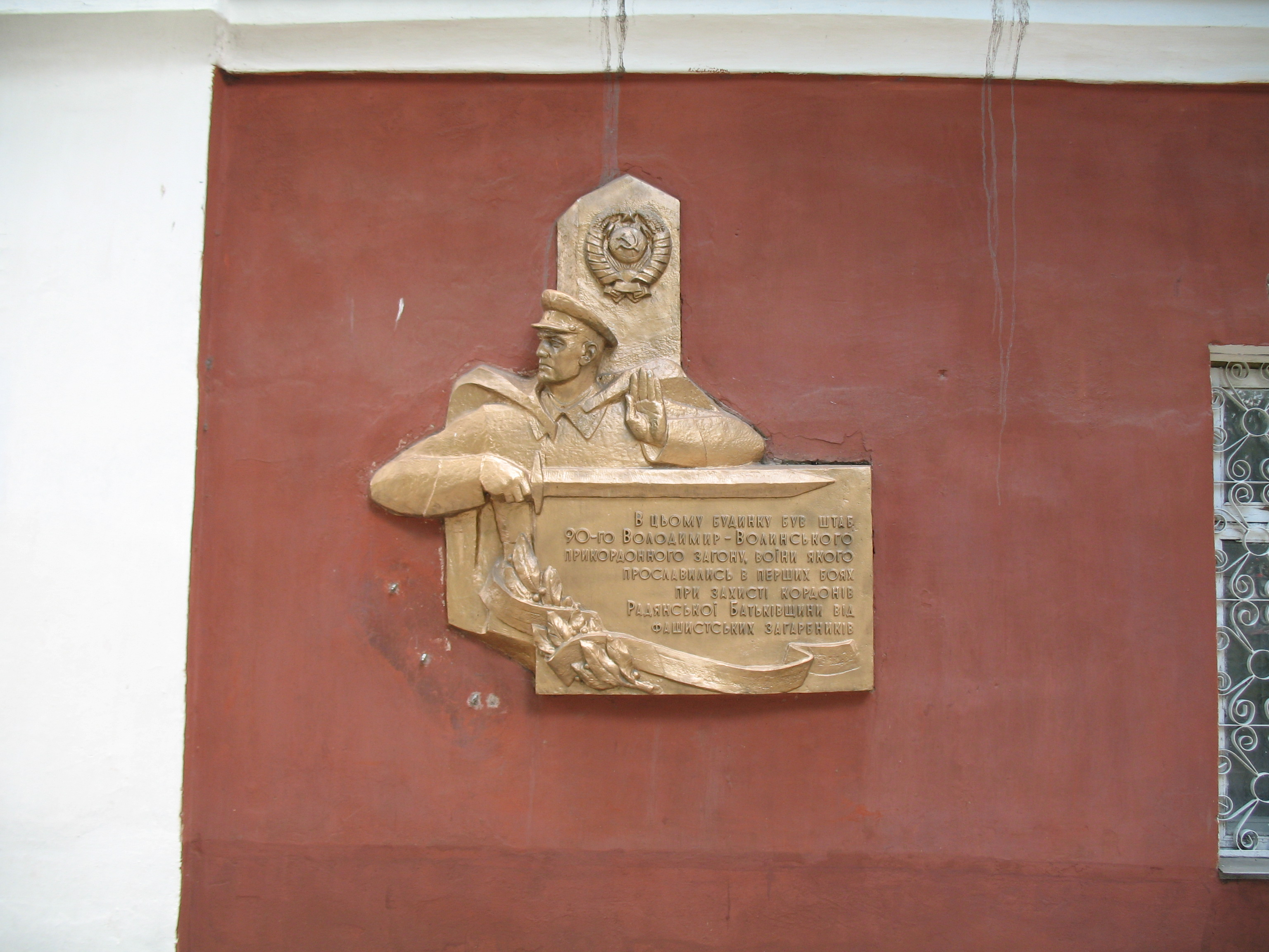 Барельєф і табличка на Домініканському монастирі у Володимирі-Волинському. Напис: «В цьому будинку був штаб 90-го Володимир-Волинського прикордонного загону, воїни якого прославились в перших боях при захисті кордонів Радянської Батьківщини від фашистських загарбників»